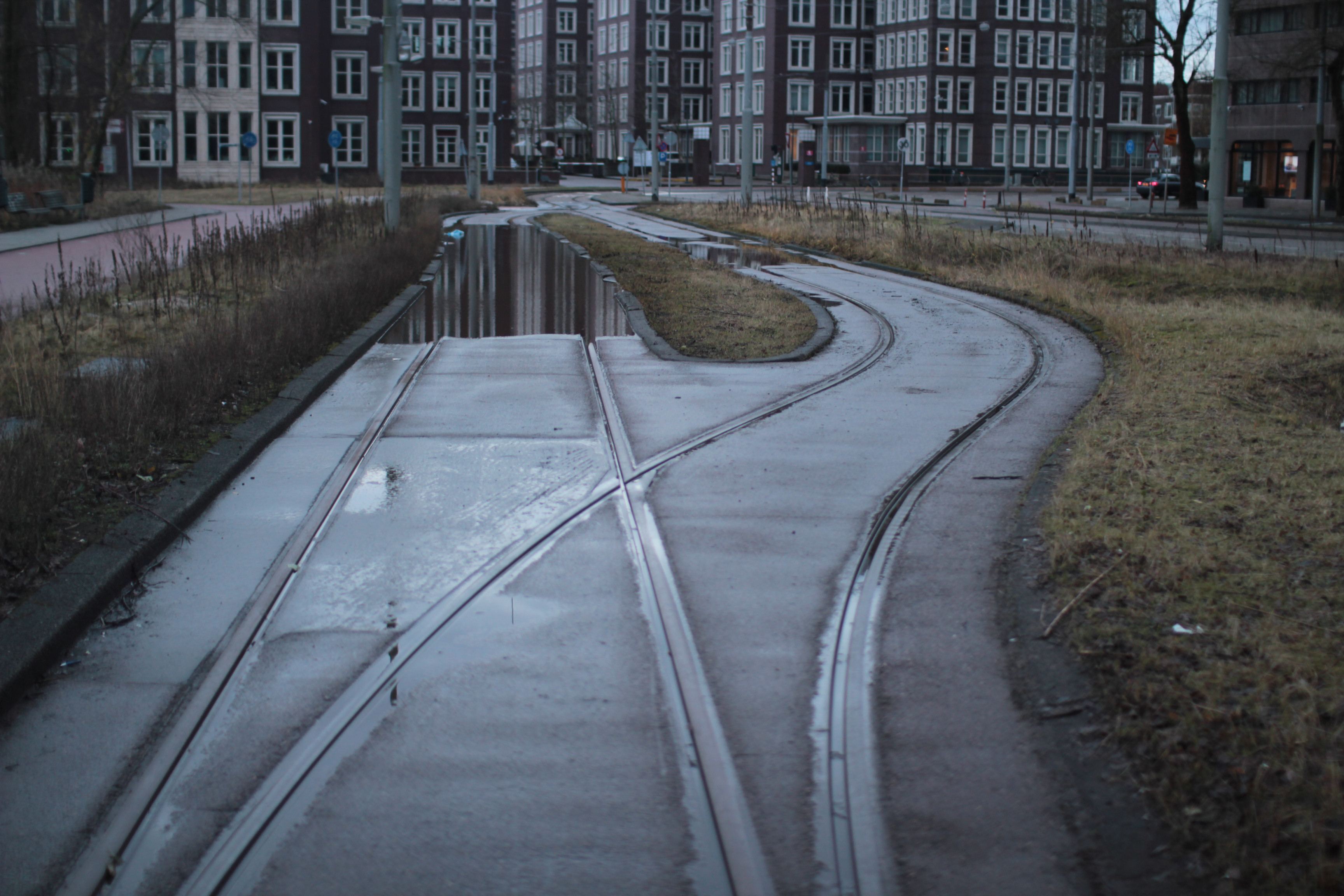 Het inhaaltramspoor op Molenwerf in Amsterdam, één van de laatste herinneringen aan station Sloterdijk-Zuid. 25 december 2012